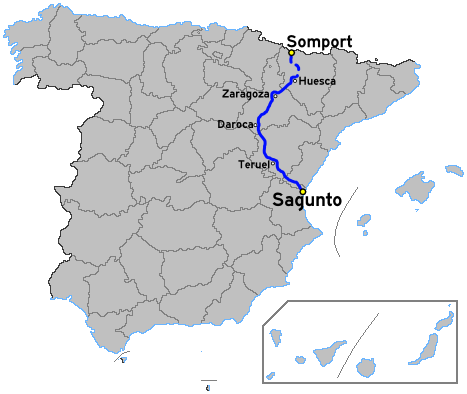 recorrido de la autovía española A23